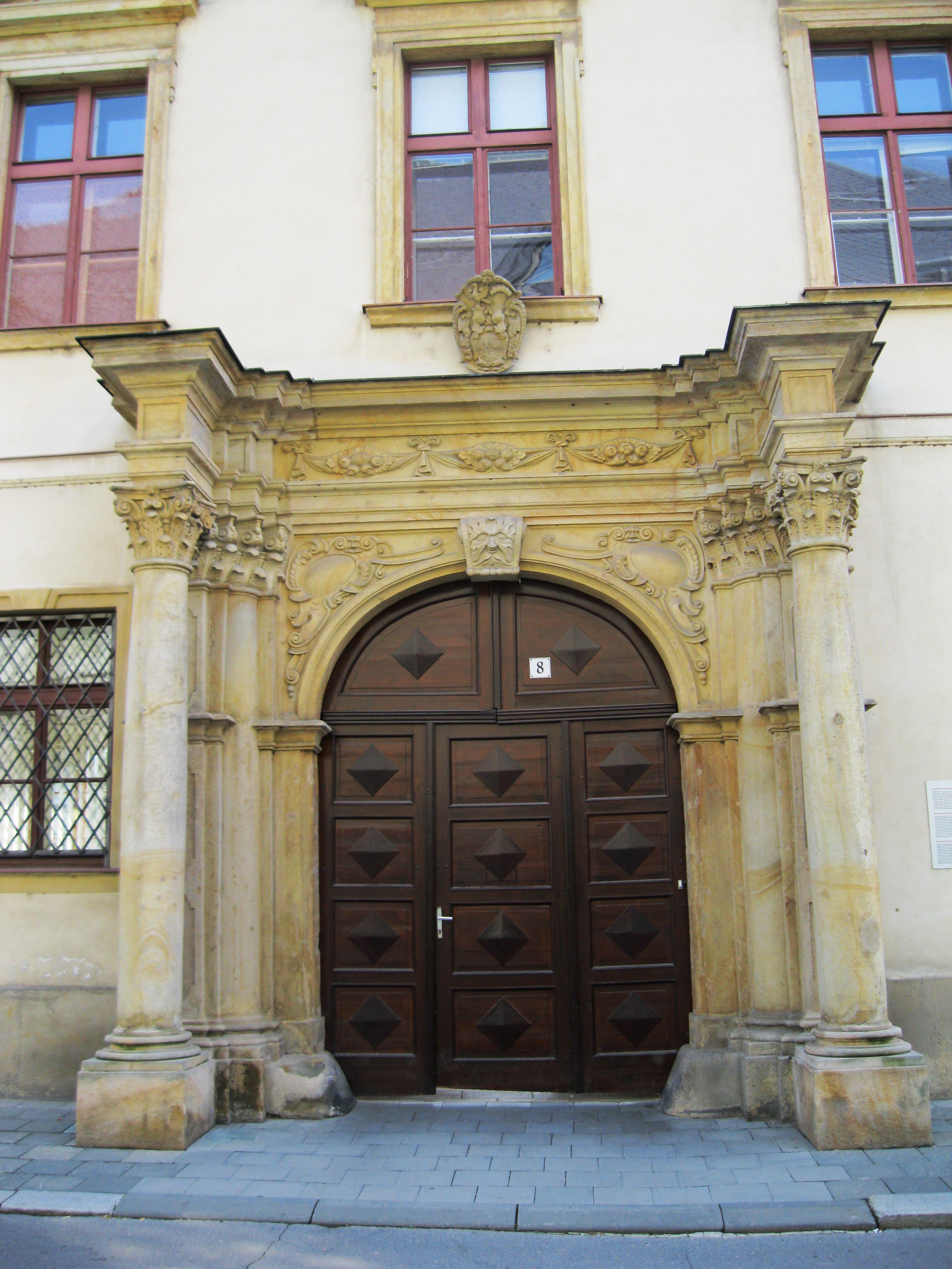 Proboštství - bývalé, dnes univerzita (Olomouc)